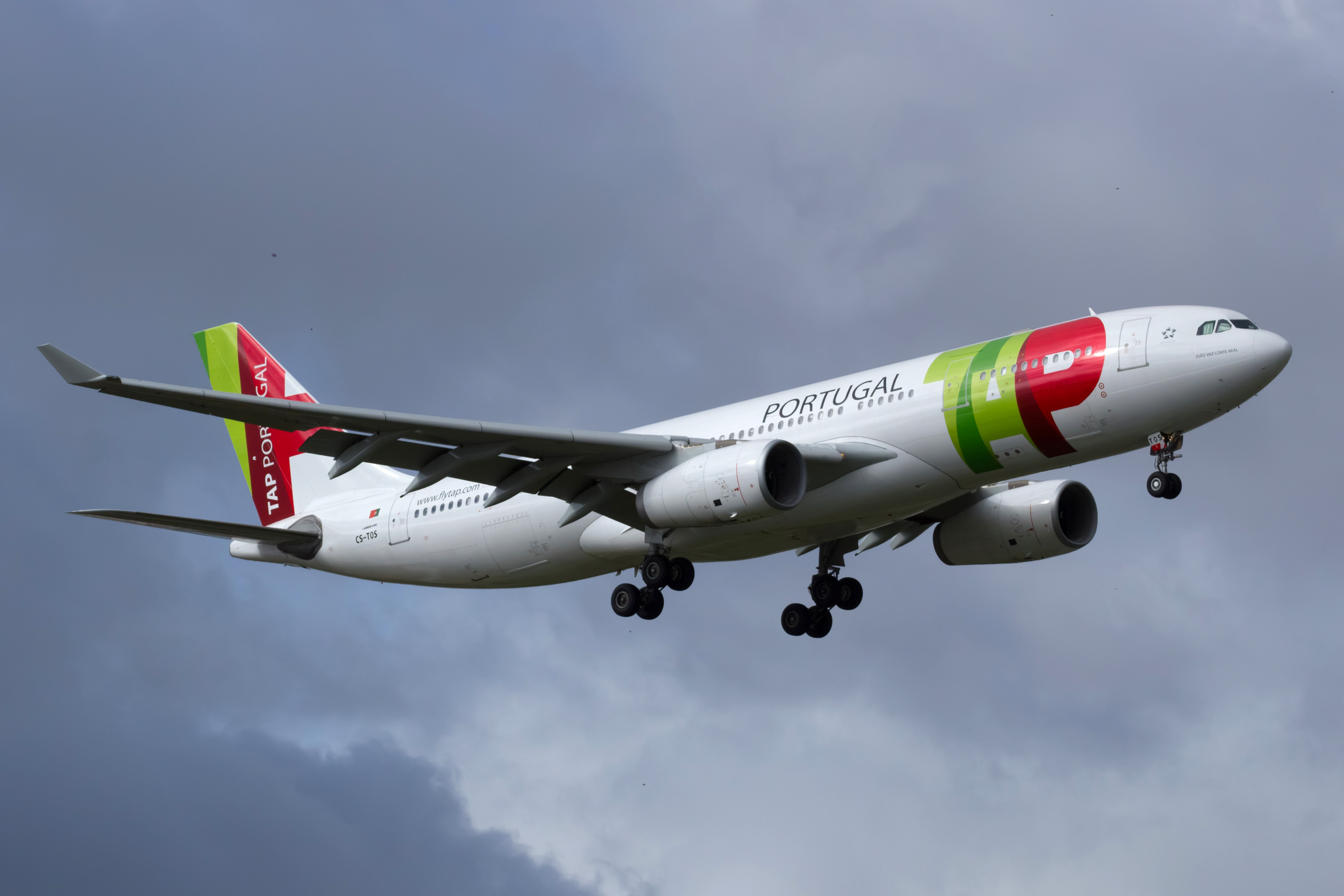 Airbus A330 de TAP aterrando no aeroporto de Lisboa.